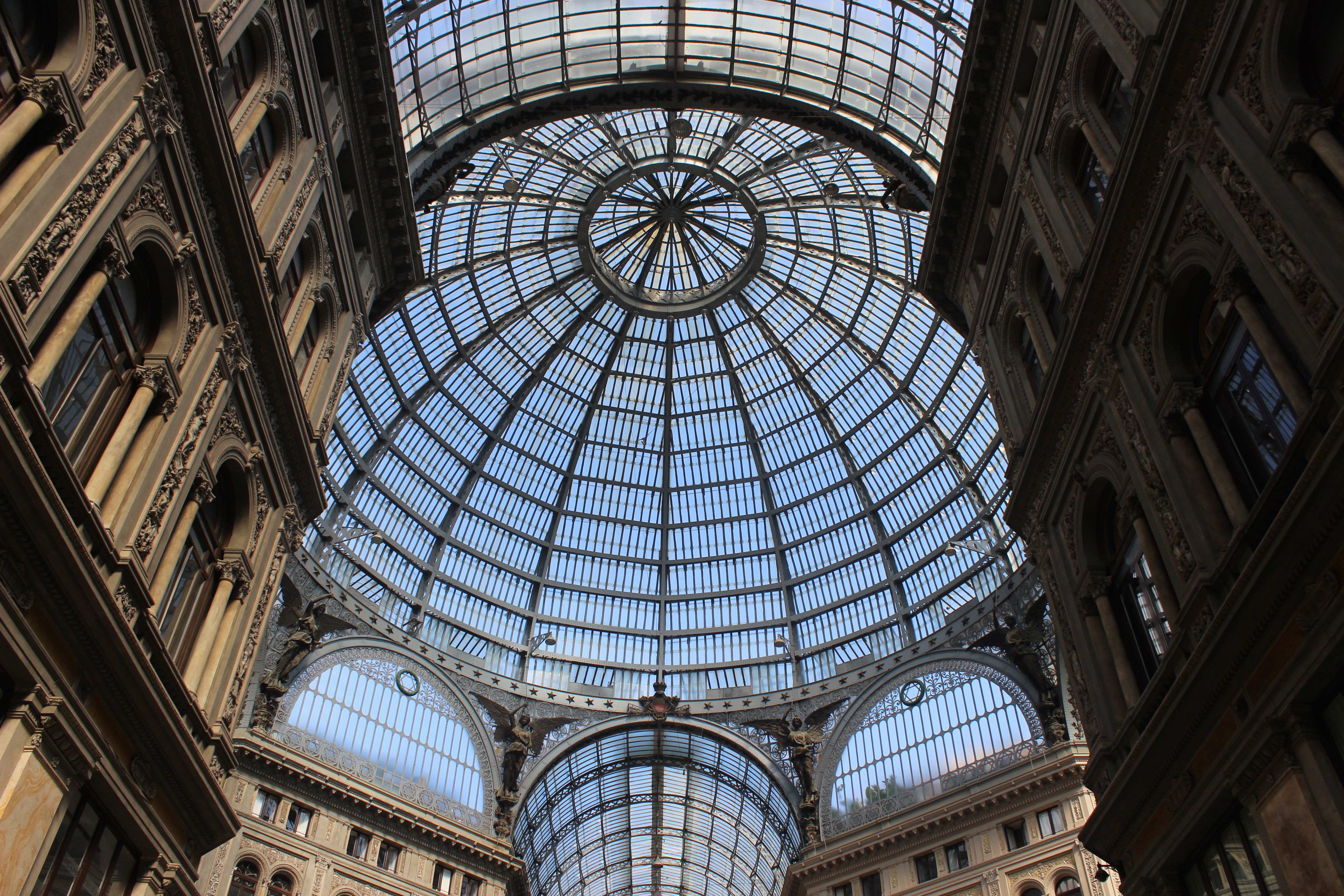 Nápoles. Galleria Umberto I, interior.